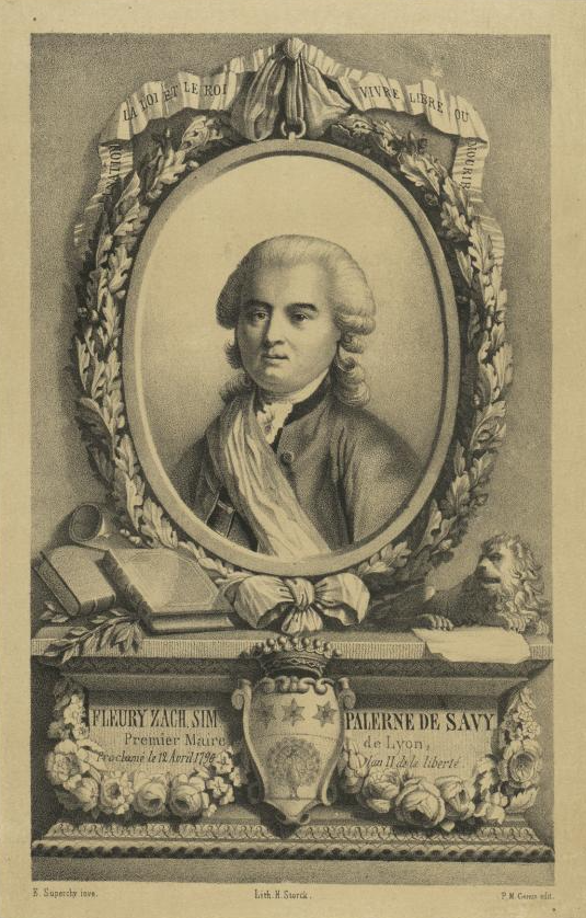 Portrait de Fleury-Zacharie-Simon Palerne de Savy - 1733 - 1835